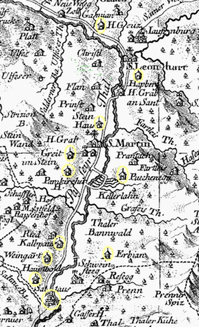 Schildhöfe im Passeier, auf einem Auszug des Atlas Tyrolensis farblich hervorgehoben